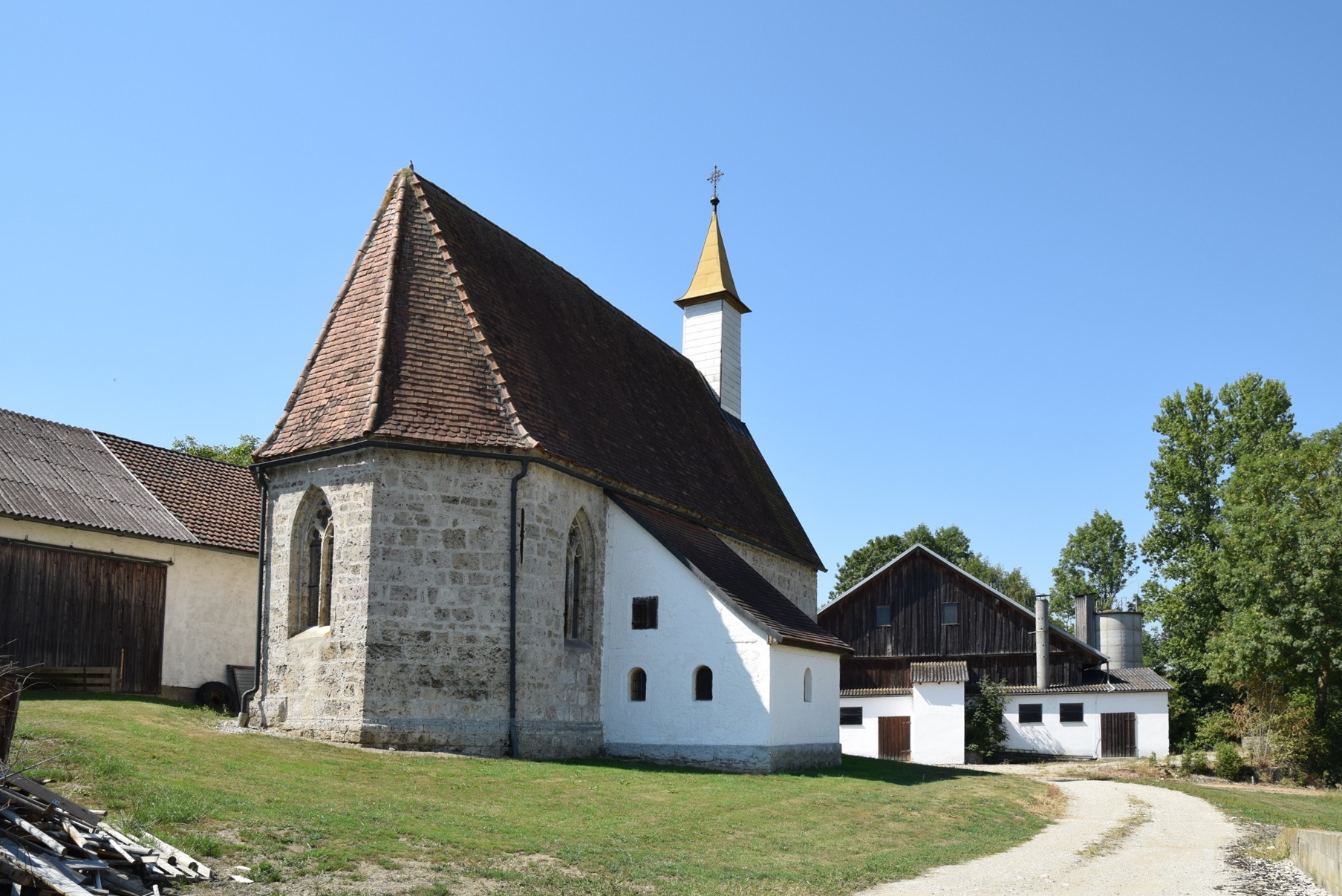 Kath. Filialkirche hl. Kreuz, ehem. hl. Valentin Dieses Foto wurde im Rahmen des von Wikimedia Österreich unterstützten Projekts Wiki Takes Innviertel erstellt. The making of this work was supported by Wikimedia Austria. For other files made with the support of Wikimedia Austria, please see the category Supported by Wikimedia Österreich.